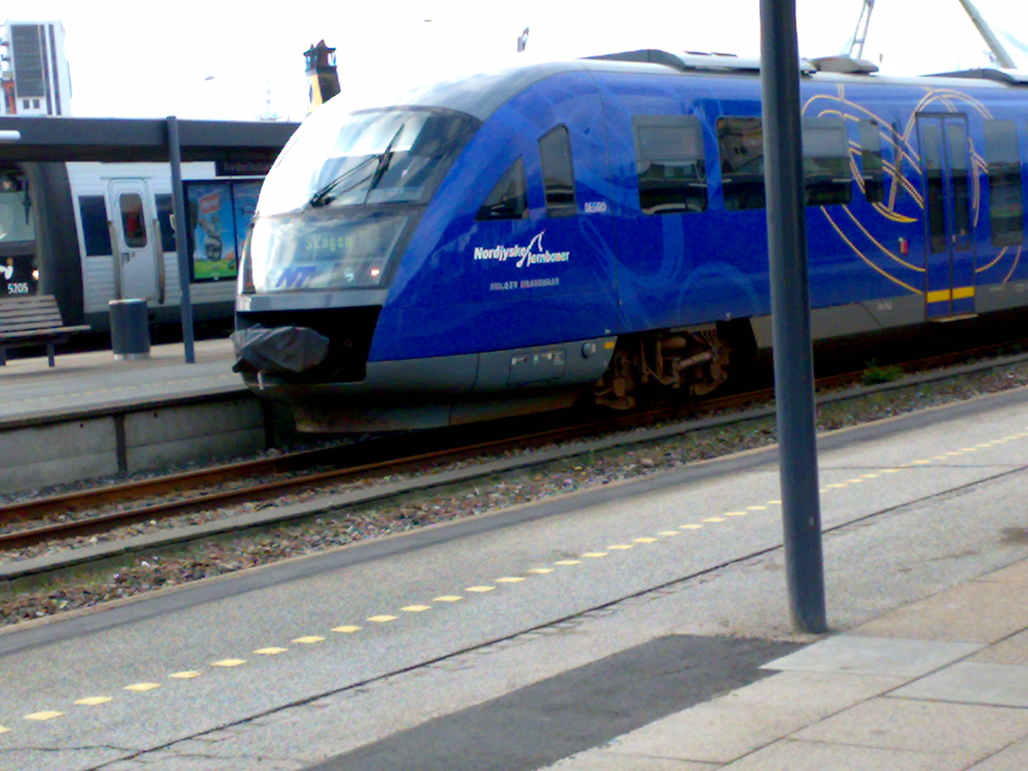 Skagensbanetog på Frederikshavn Station